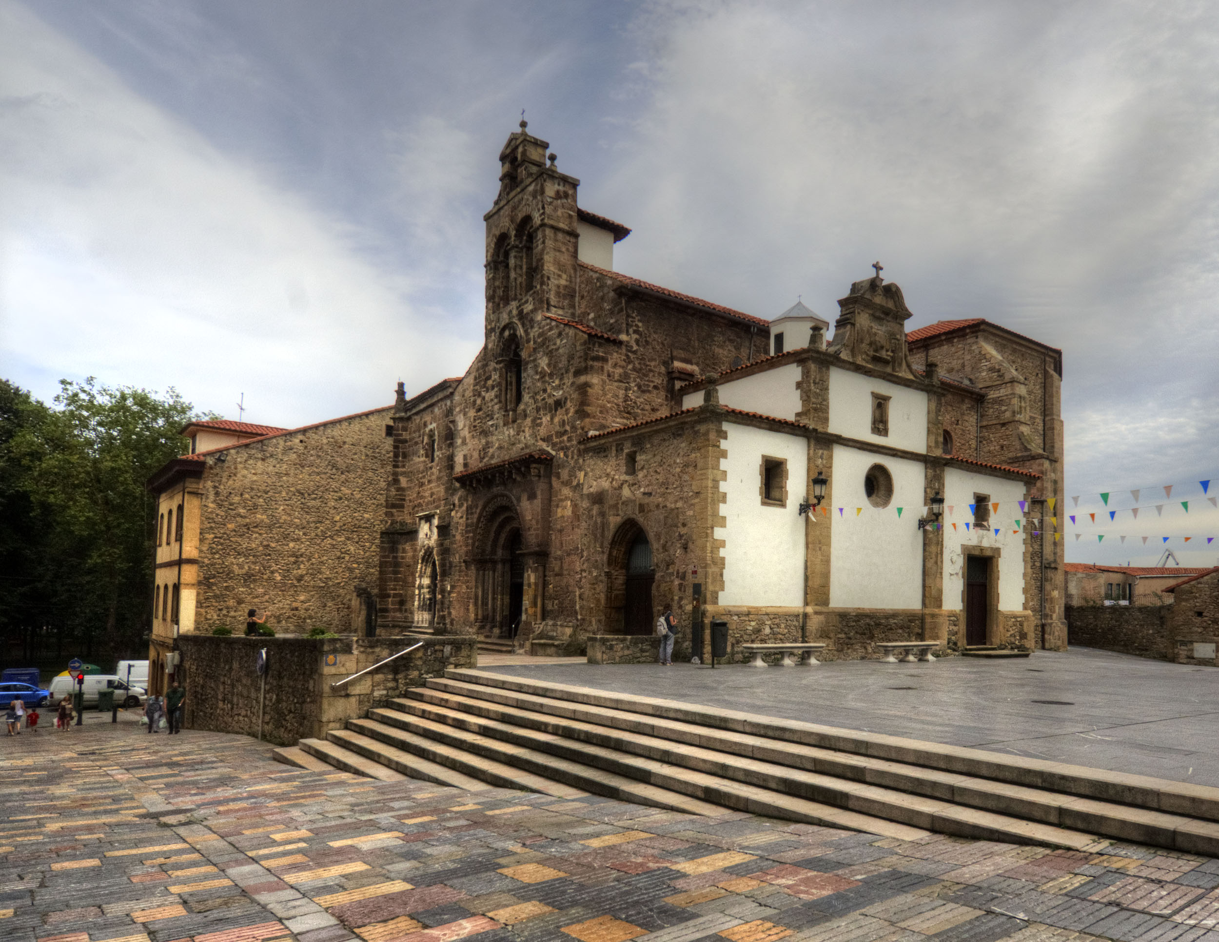 La iglesia de los Padres Franciscanos, es un templo dedicado a San Antonio de Padua y ubicado en la plaza de Carlos Lobo en Avilés, Asturias. Se construyó en el siglo XII y conserva su portada románica. Sobre la portada de la iglesia se conserva la huella de un tejado que recuerdo haber visto en alguna foto antigua.